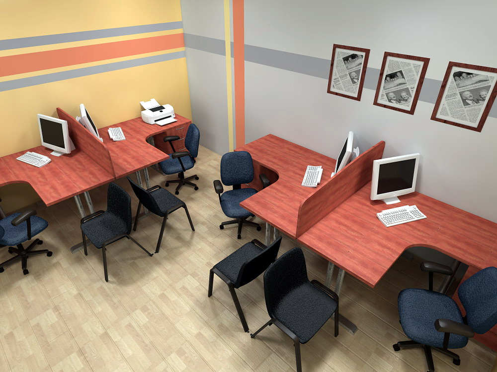 Дизайн-проект офисного рабочего места